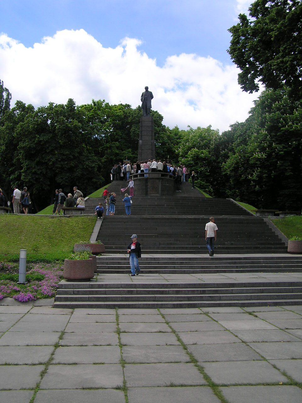 Могила поета Т. Г. Шевченка та пам’ятник Т.Г.Шевченку, Канів, Тарасова (Чернеча) гора, Шевченківський національний заповідник